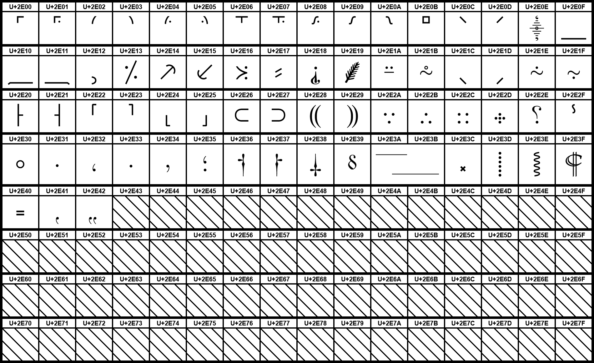 Grafiktafel für den Unicodeblock Zusätzliche Interpunktion. Schraffierte Felder sind unbesetzte Codepoints.